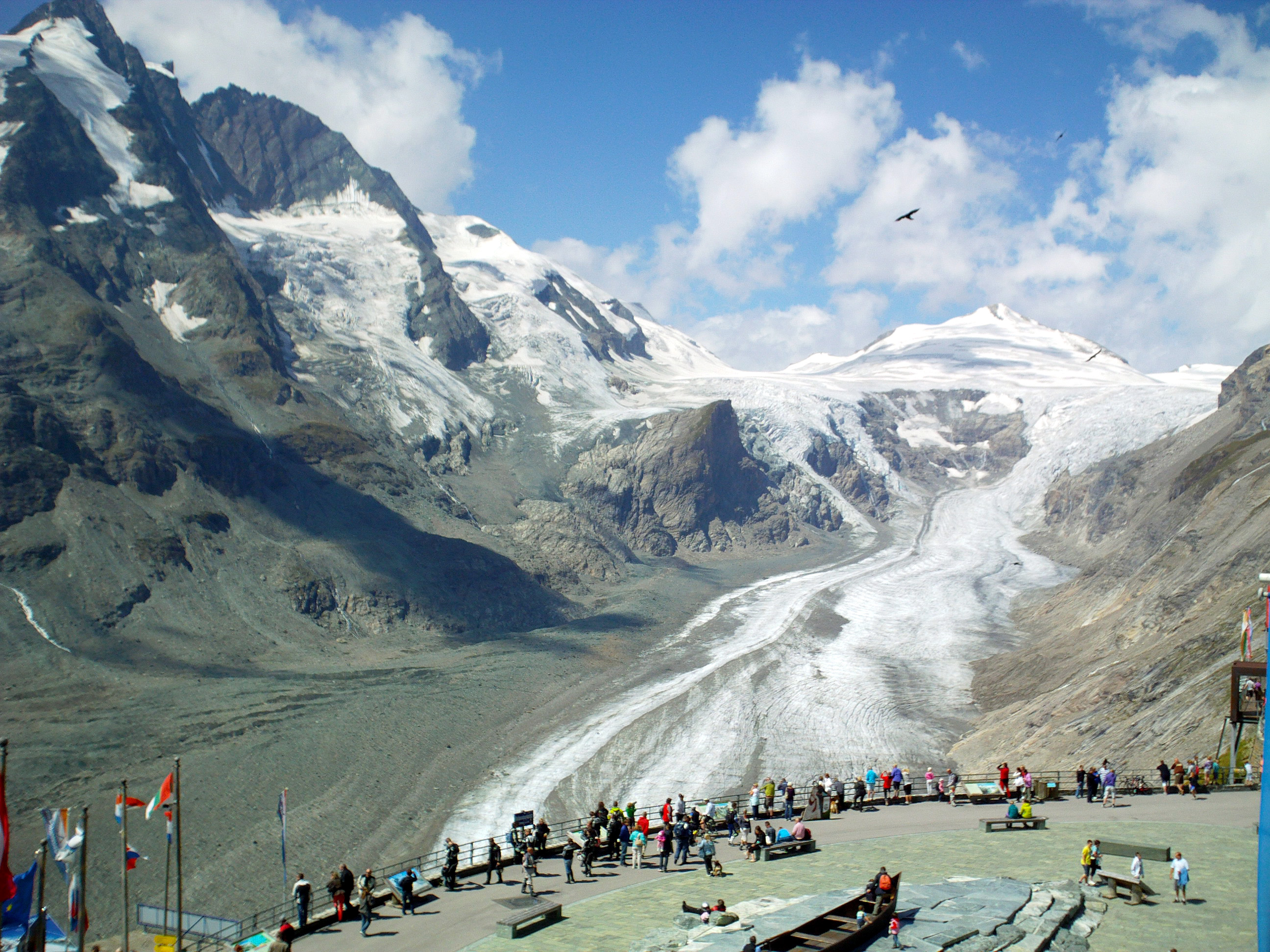 Gemeinde Heiligenblut, 9844, Austria